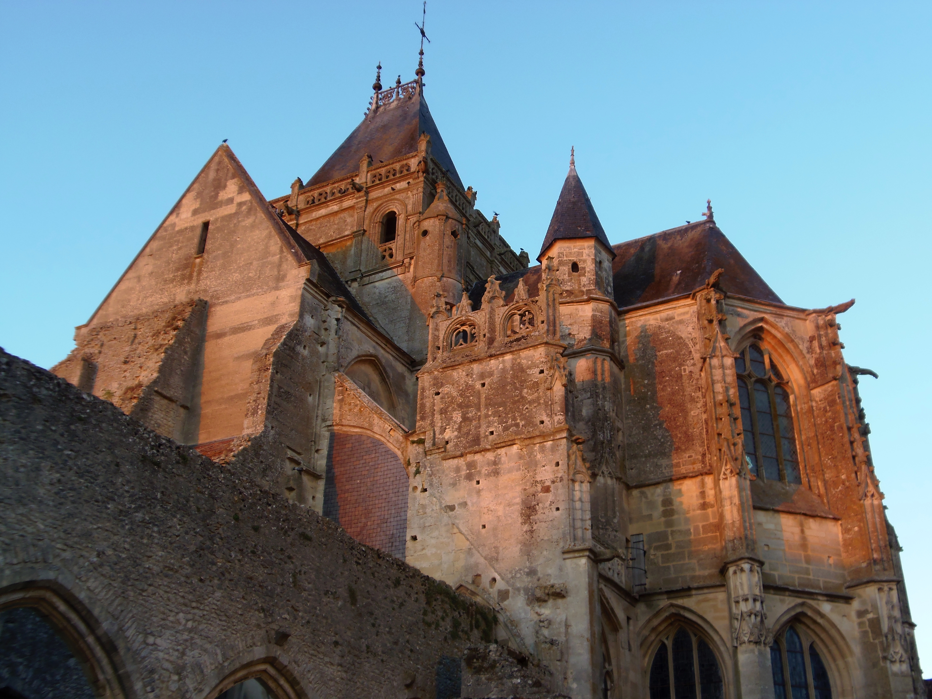 Écouché (Normandie, France). L'église Notre-Dame.